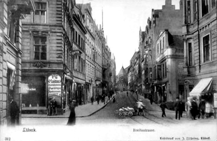 Mittere Breite Straße um 1906